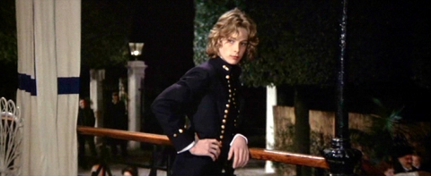 Képkocka a „Halál Velencében” című filmből